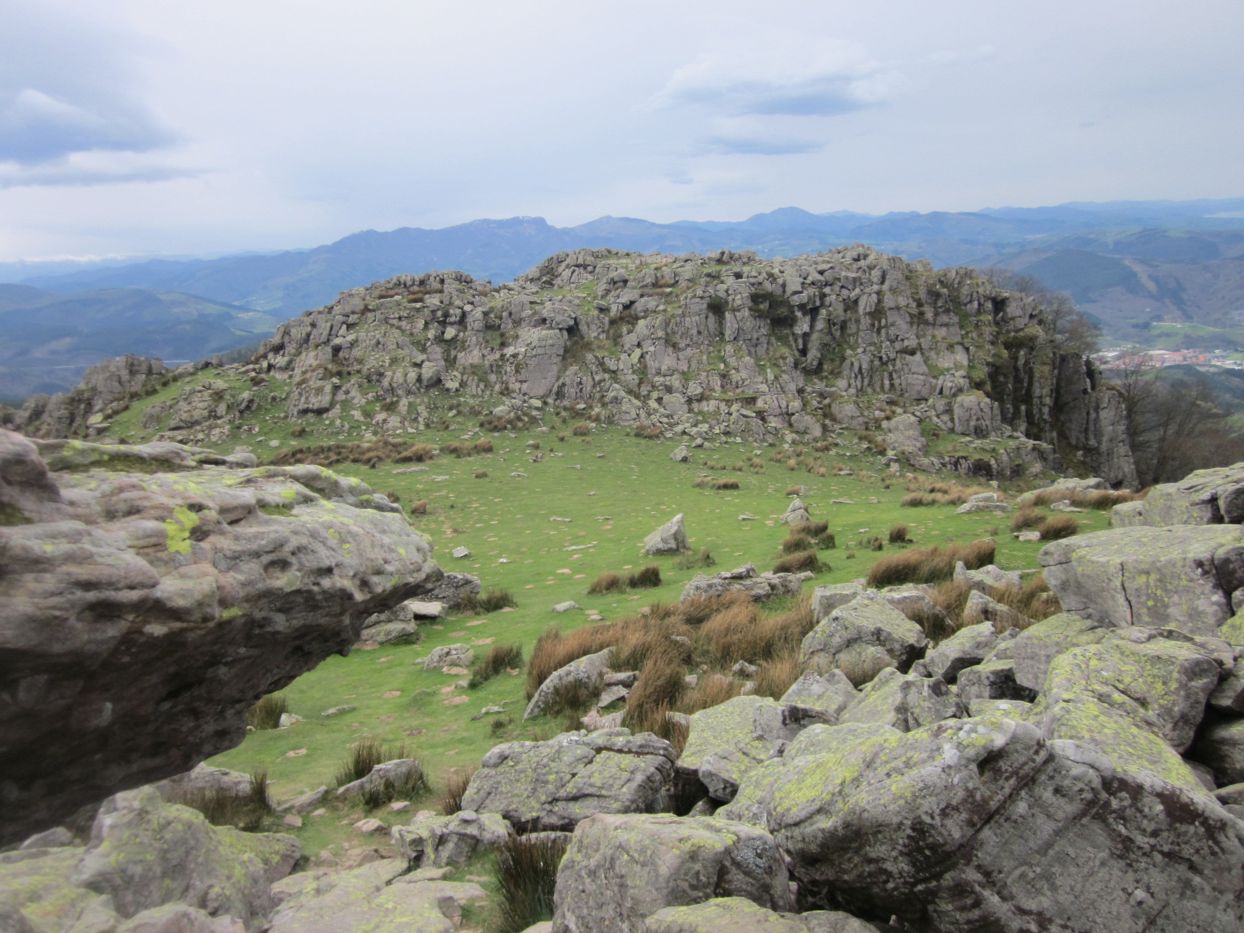 Une sommet vue de l´autre.